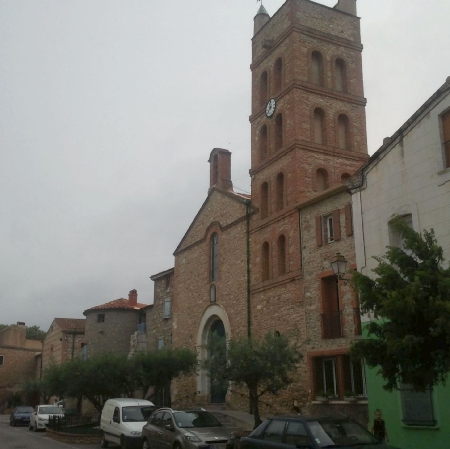 Place de l'église à Corneilla-la-Rivière